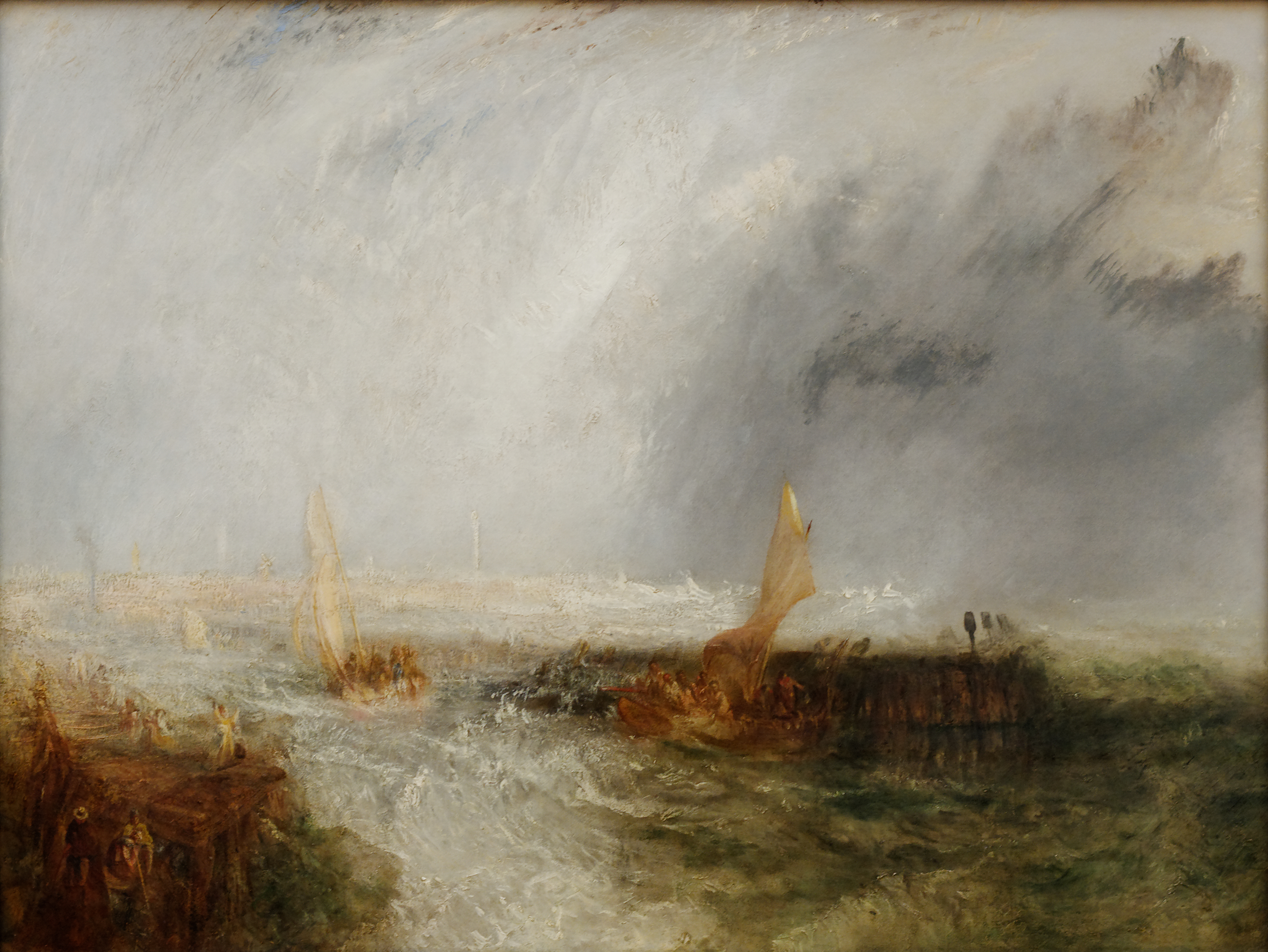 Ostende.